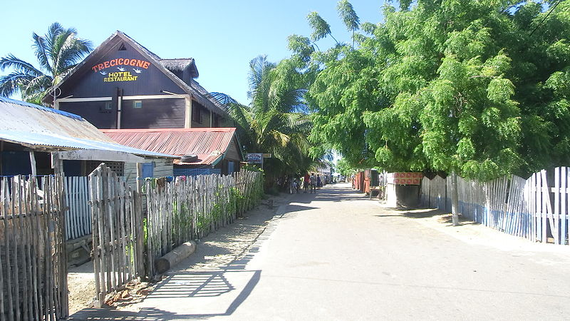 Strada di Morondava